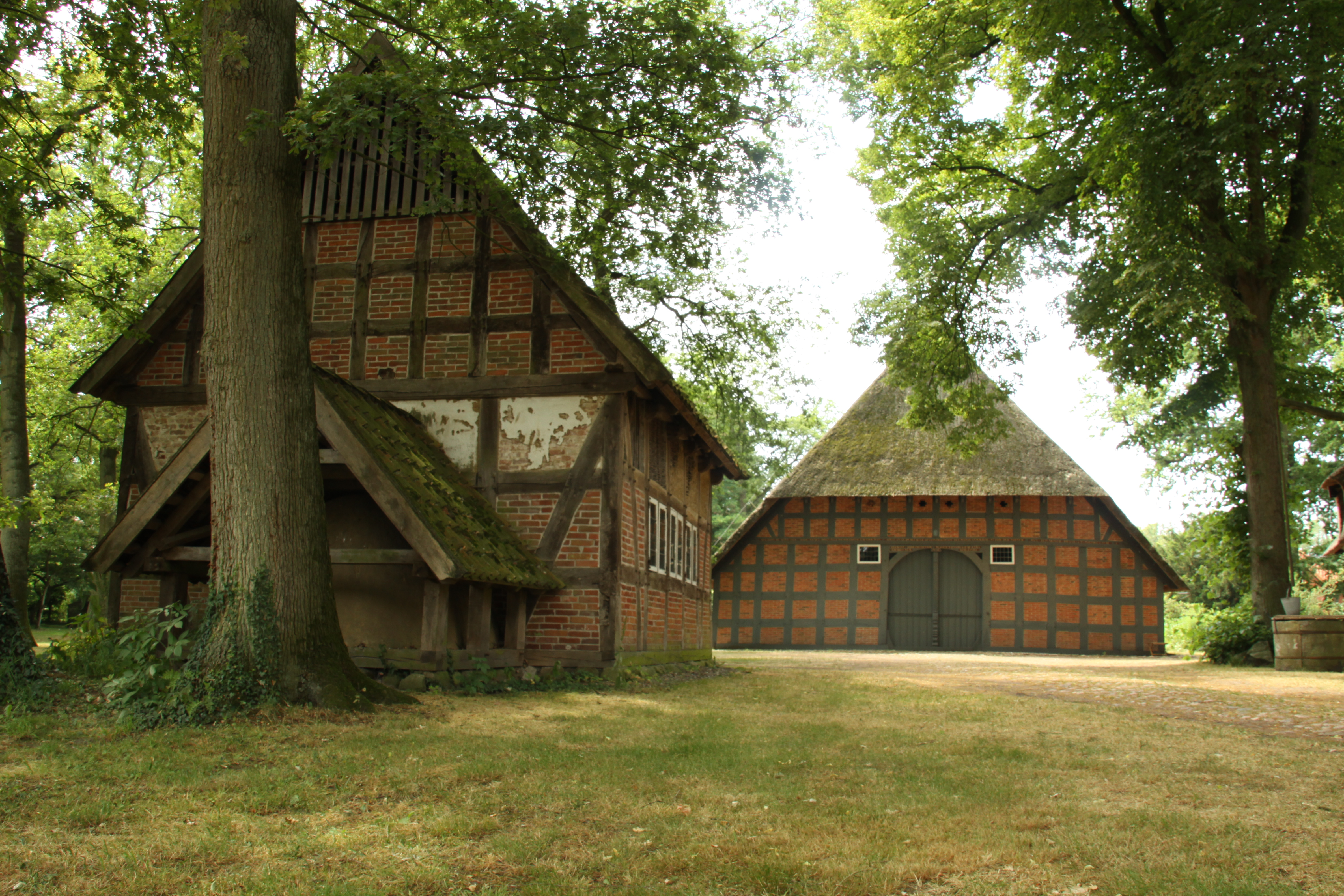 Fischerhude Farm House